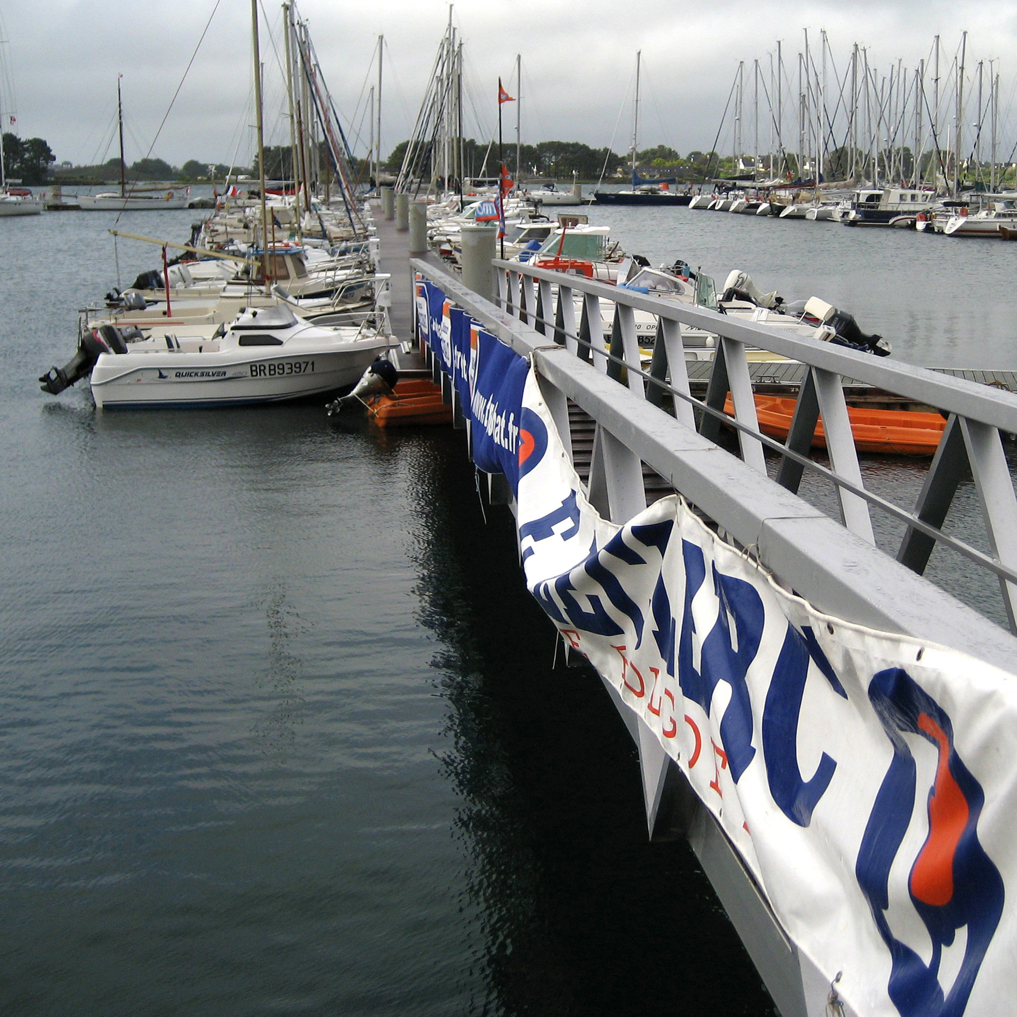 Schwimmsteg, 1=Gezeiten, Flut, L'Aberwrac'h